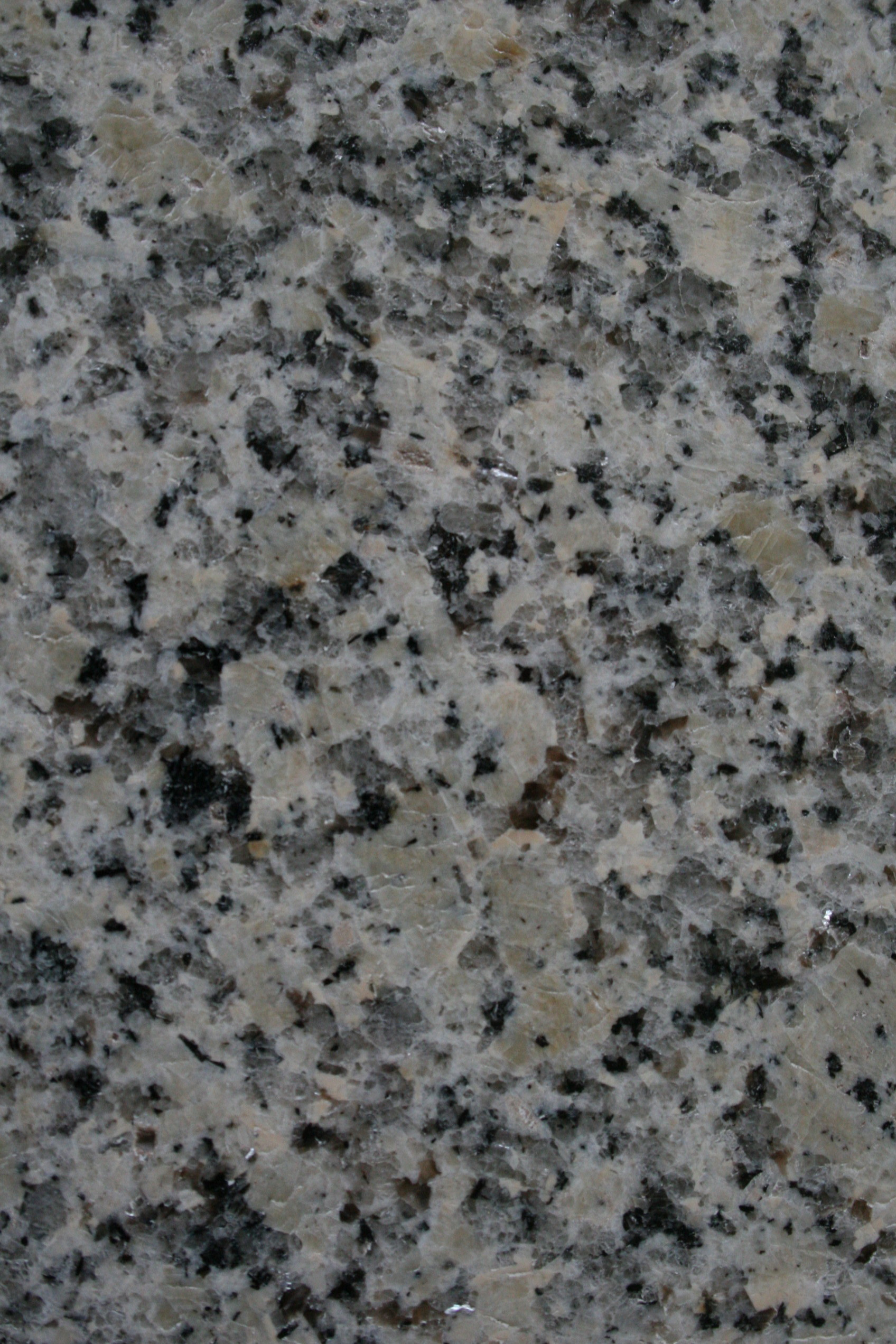 Epprechtstein-Granit, Muster ca. 15 cm Kantenlänge